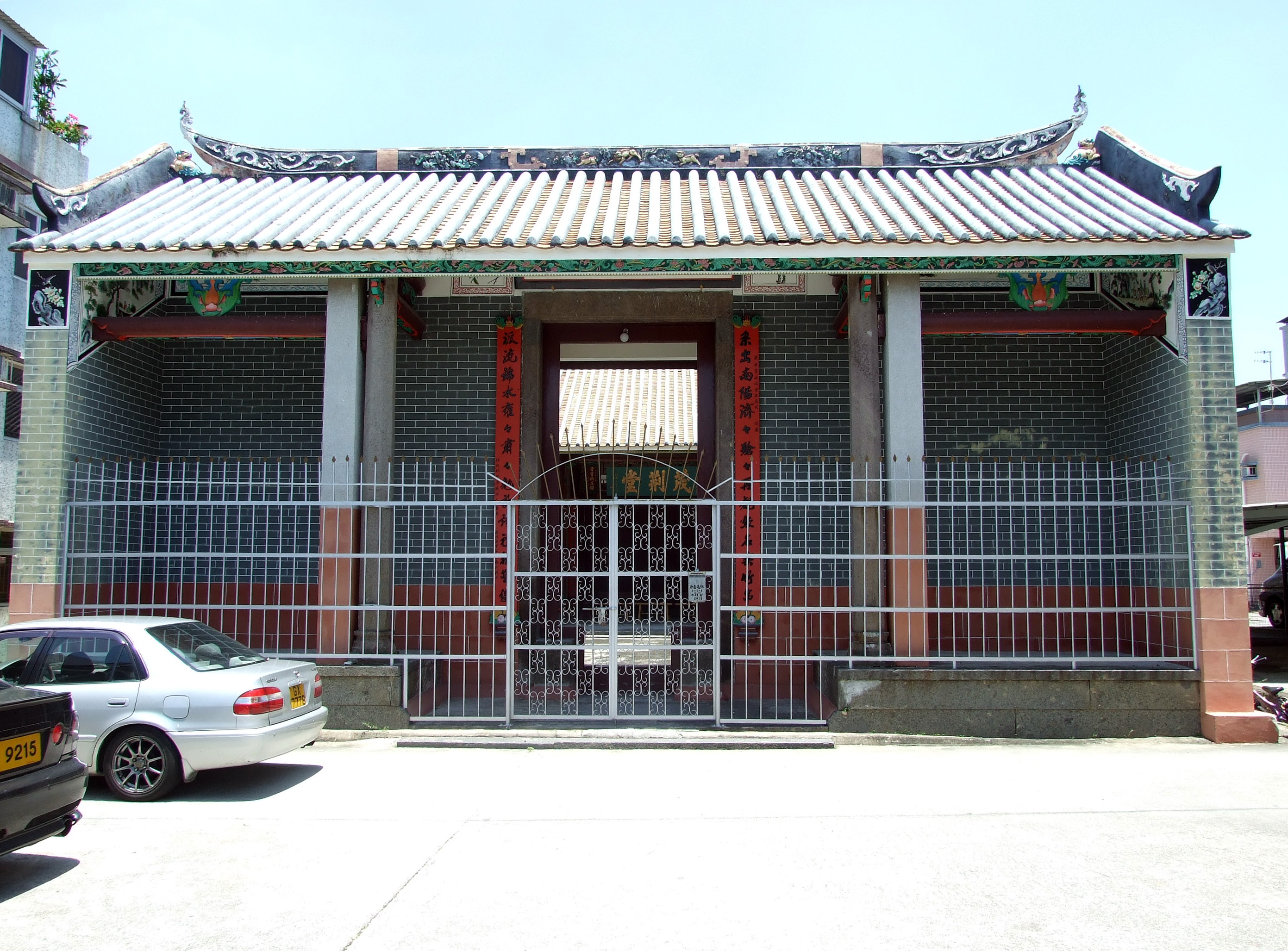 中文（香港）: 鎮銳鋗鄧公祠